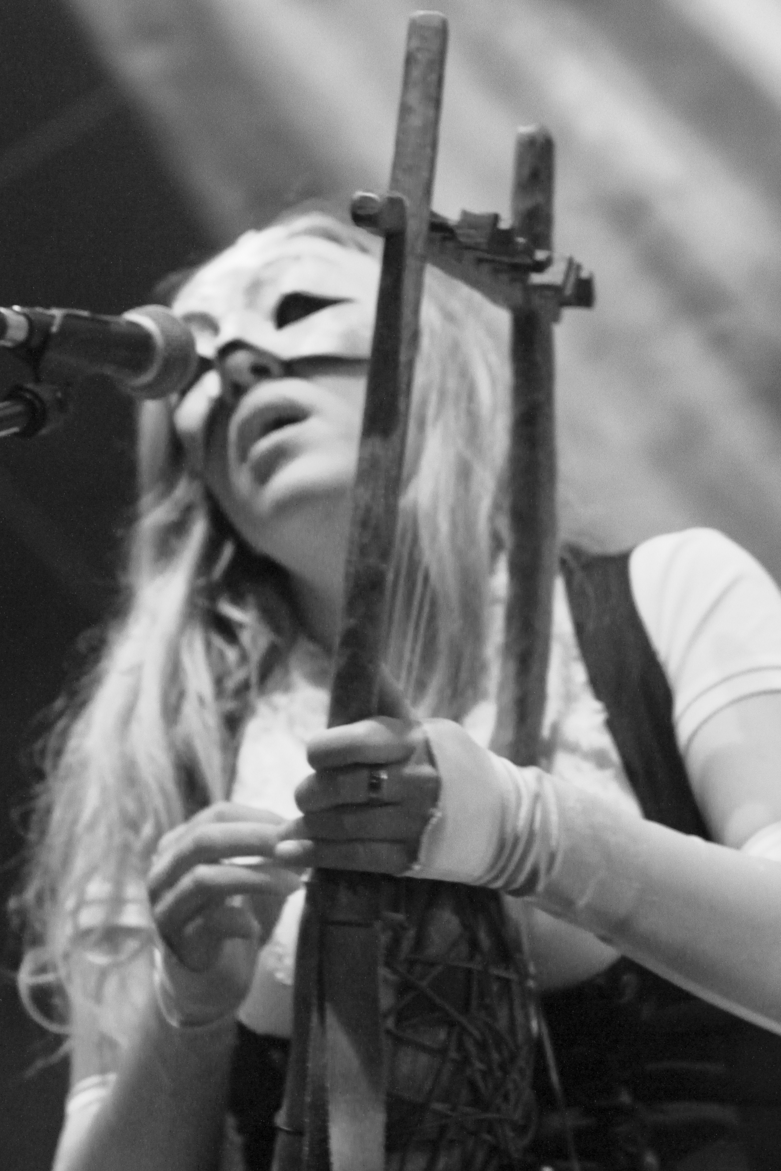 Daemonia Nymphe (Δαιμόνια Νύμφη) auf dem Wave-Gotik-Treffen 2013 in Leipzig, Heidnisches Dorf.